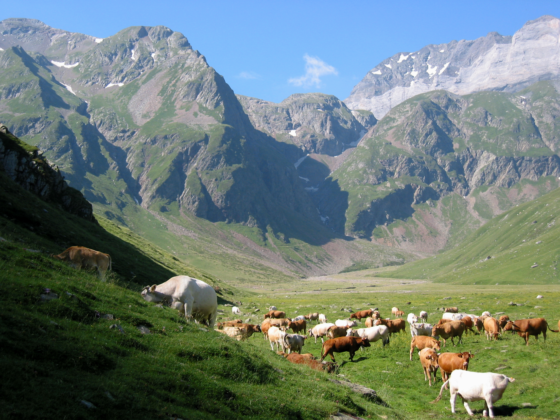 Vaches dans les estives du grand replat de la Vallée de La Gela ; au fond : à gauche le Pic de Port Vieux, à droite la muraille de Barroude, au-dessus du Pichous de Barroude.